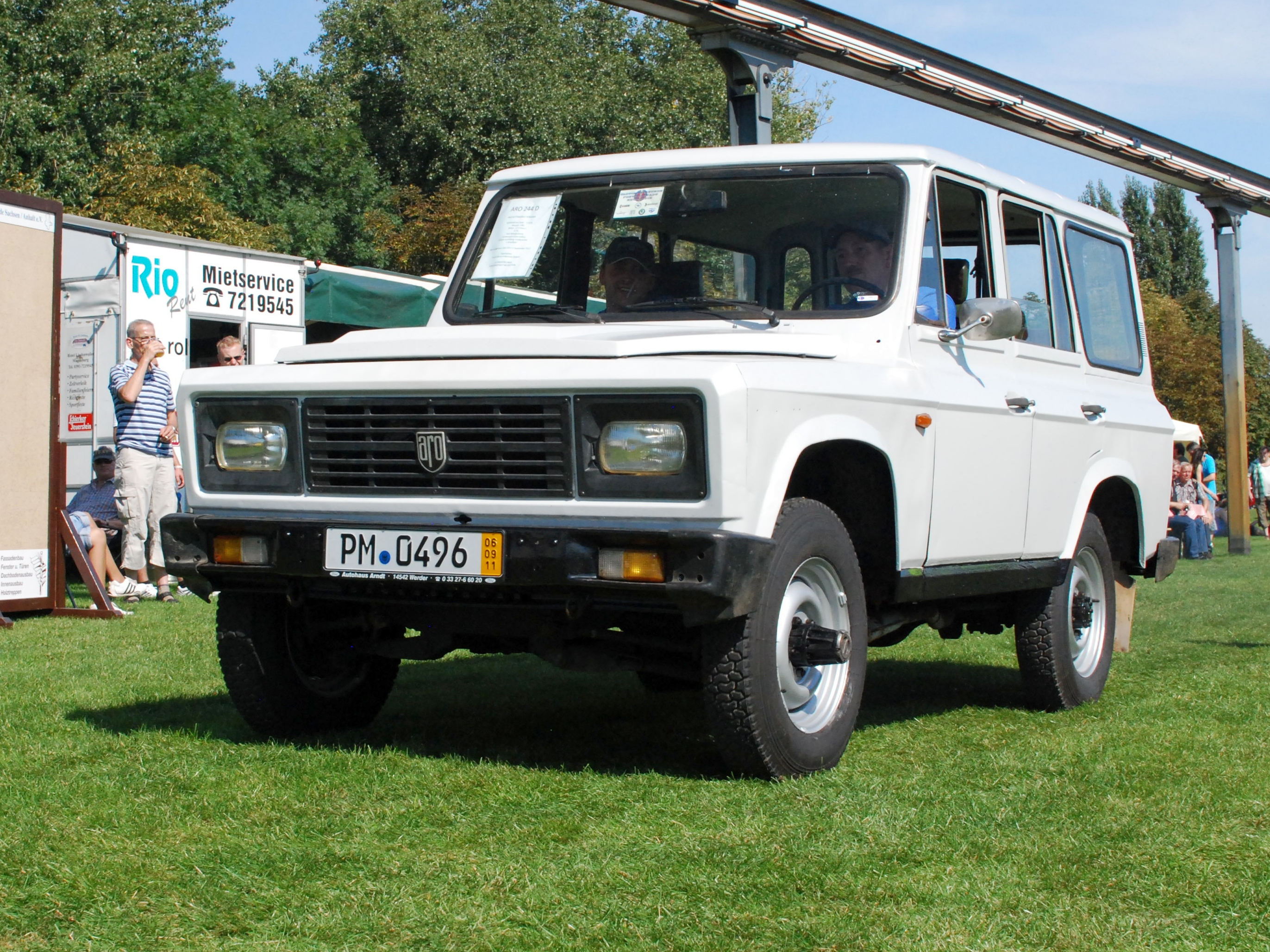 ARO 24 Fotos von der OMMMA 2011 am 03.09.2011 im Magdeburger Elbauenpark